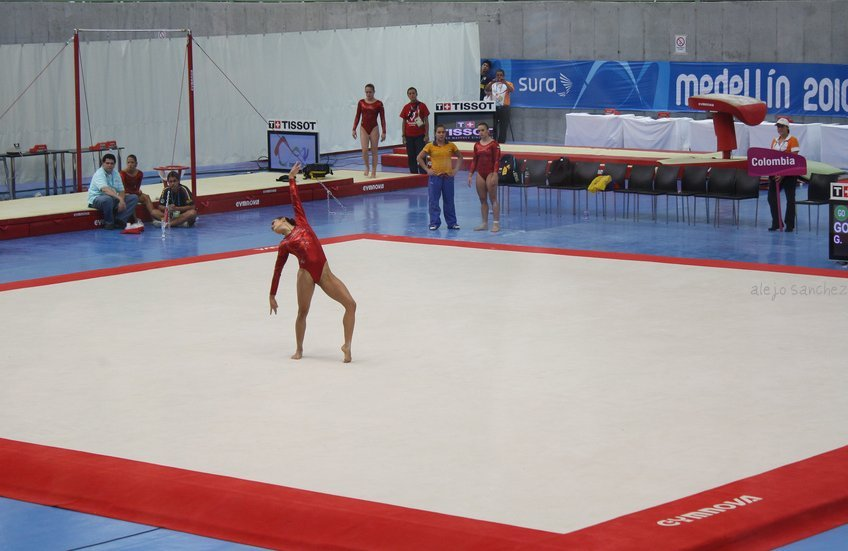 Gimnasia en los Juegos Sudamericanos de 2010